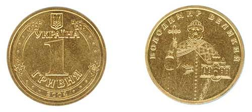 1 гривня з зображенням Володимира Великого